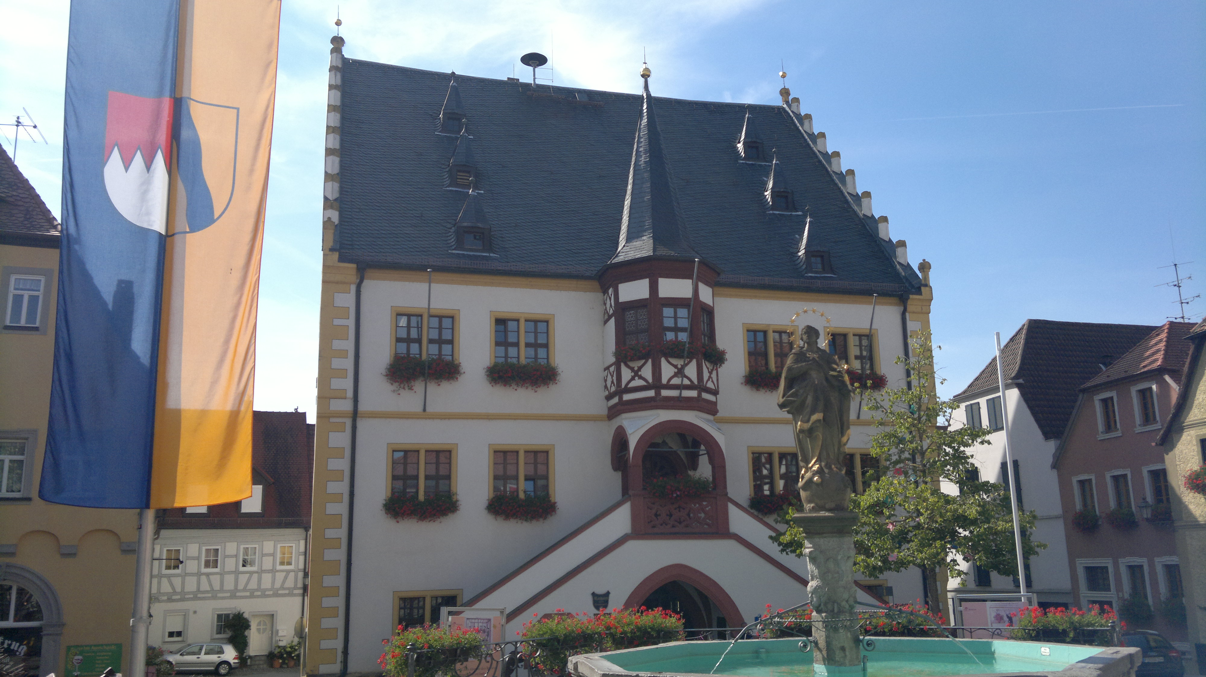 Volkach, Germany